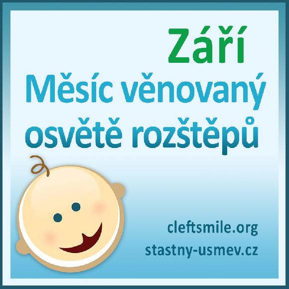 rozštěp